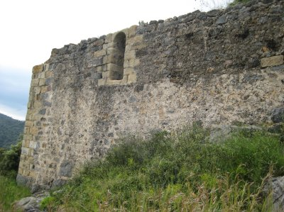 Castell de Montpalau, Pineda de Mar, Maresme